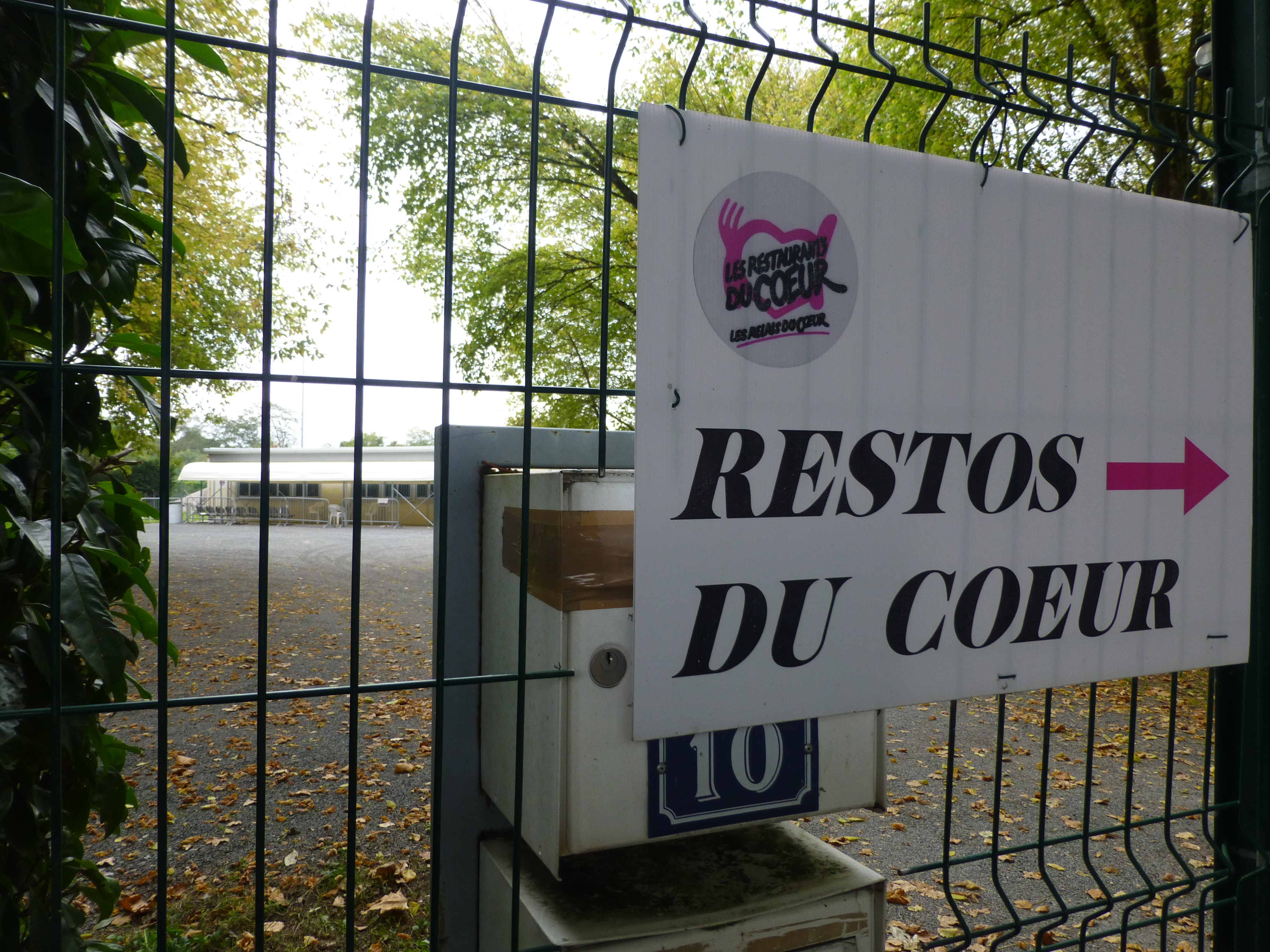 Angers, Les restos du coeur, octobre 2015